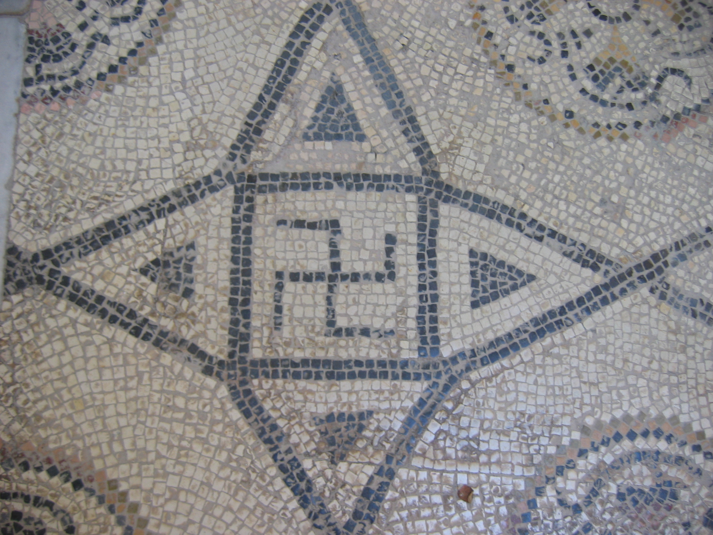 Swastika ciudad de origen Romano mosaico del siglo II,se encuentra actualmente en Tunez,la tecnica de elaboracion de este mosaico es Opus Signinum ,hecho con cuadros de marmol color blanco y negro. Dimensiones : 1.2m de altura X 1.0 de largo. author Maciej Szczepańczyk-user:Mathiasrex